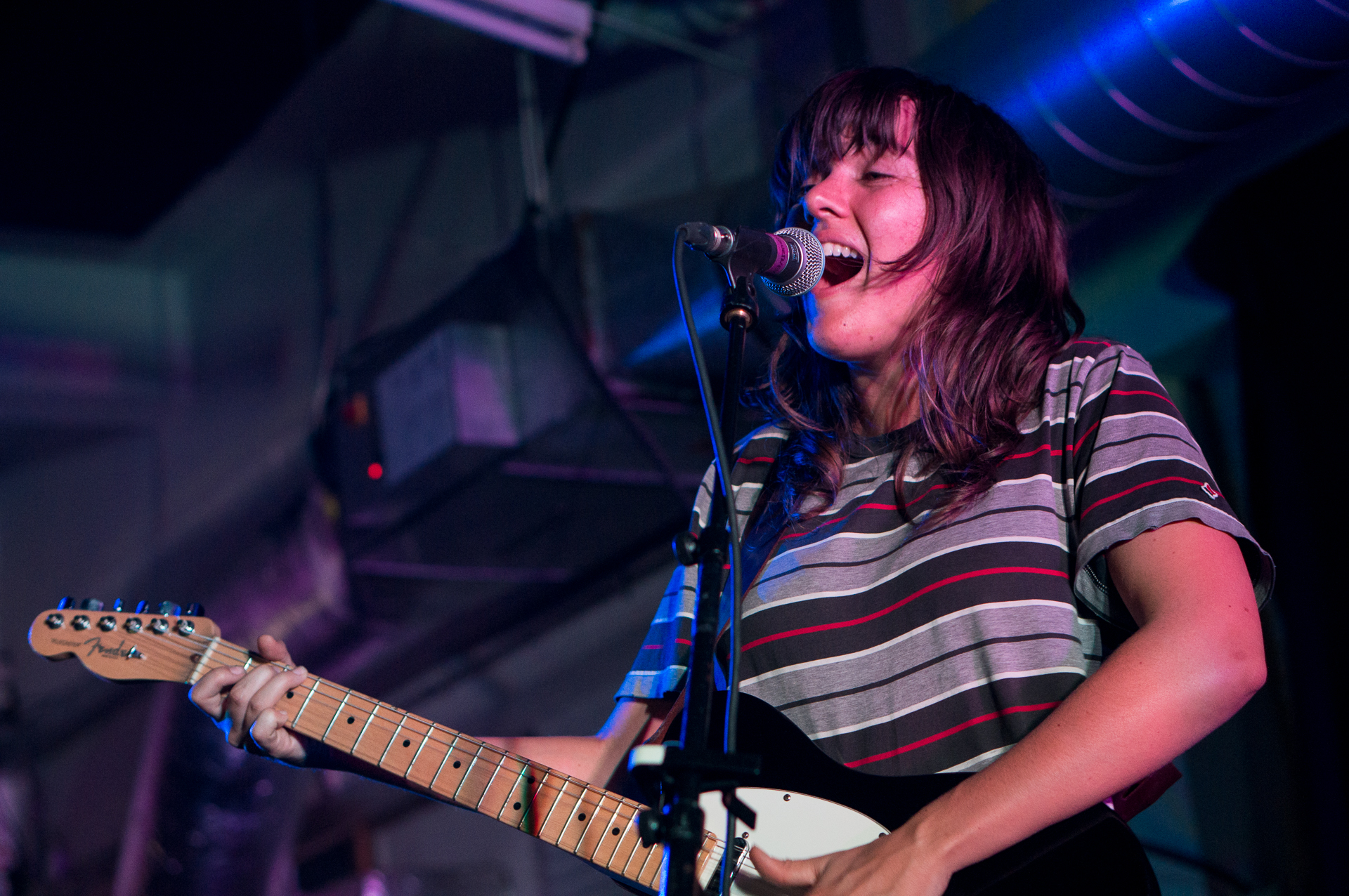 La cantante Courtney Barnett en 2015.